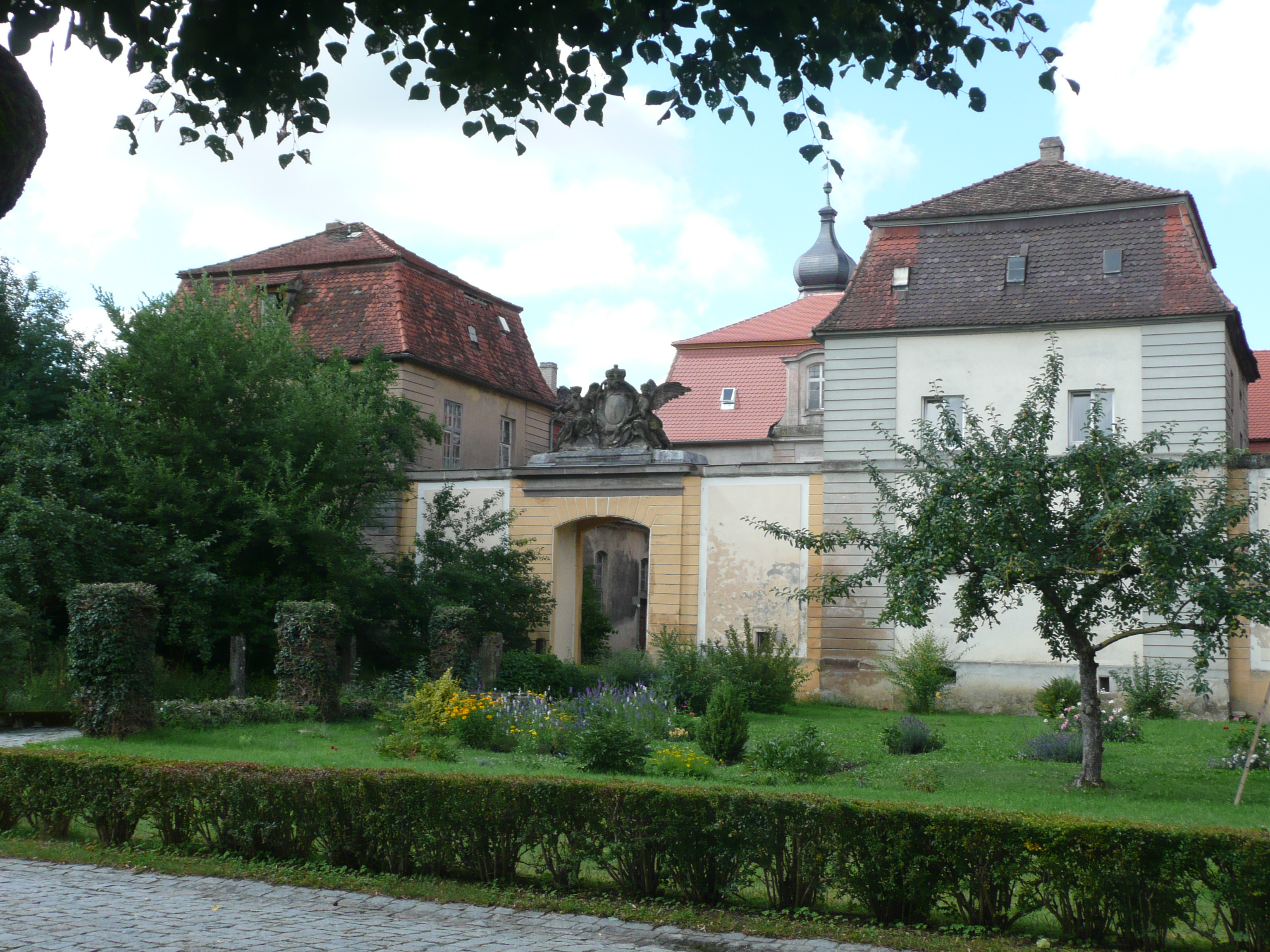 Schlossgebäude